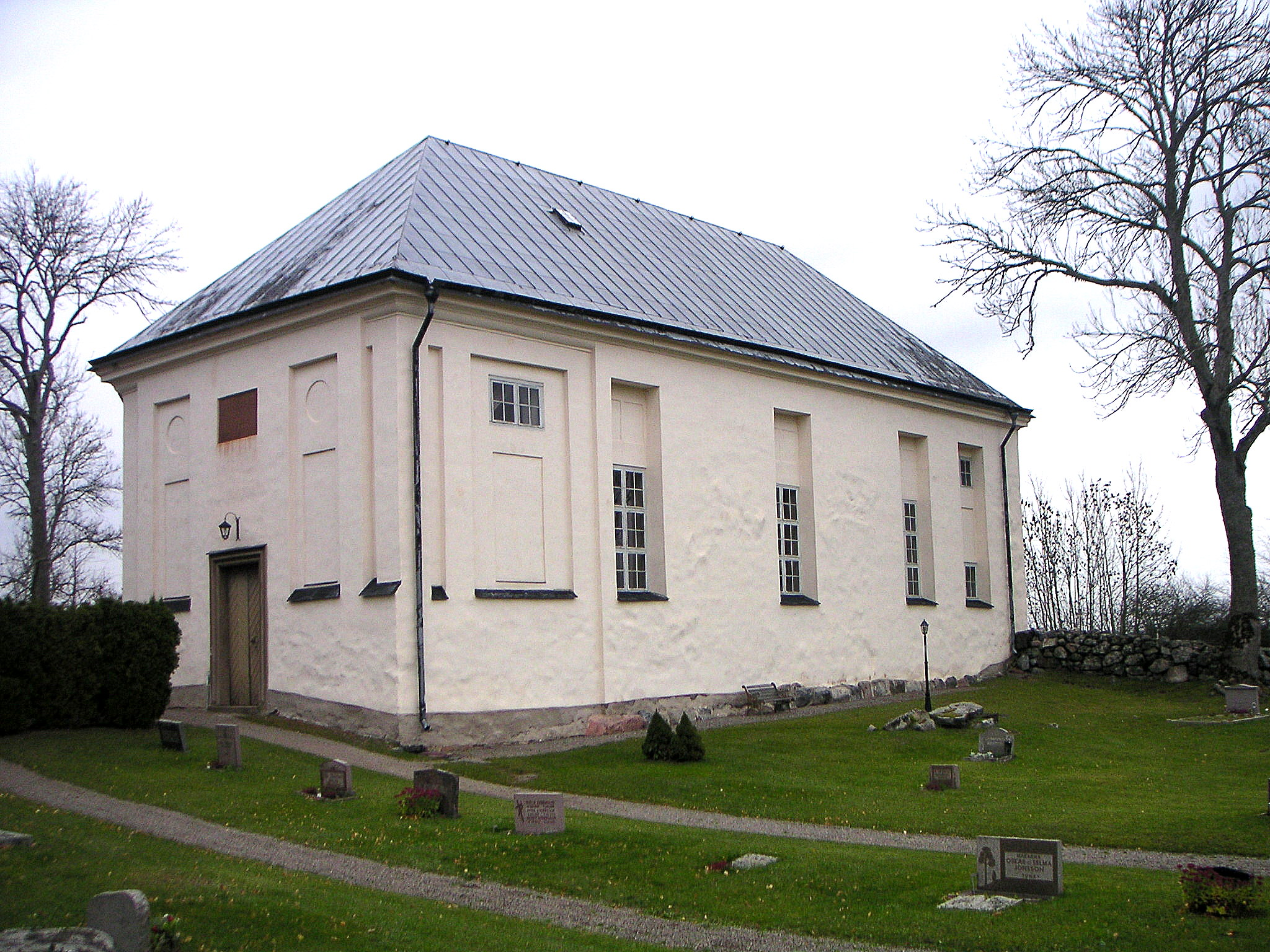 Holms kyrka, Enköpings kommun